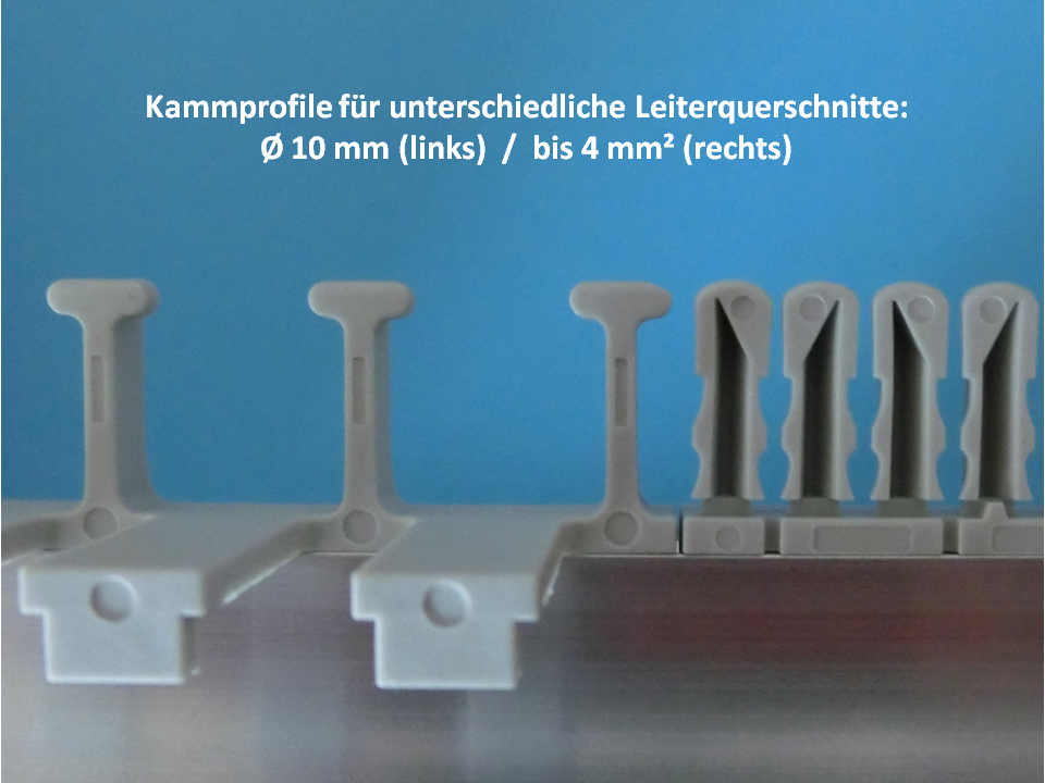 Verdrahtungssystem: Kammprofile für unterschiedliche Leiterquerschnitte (Fabrikat: LÜTZE)